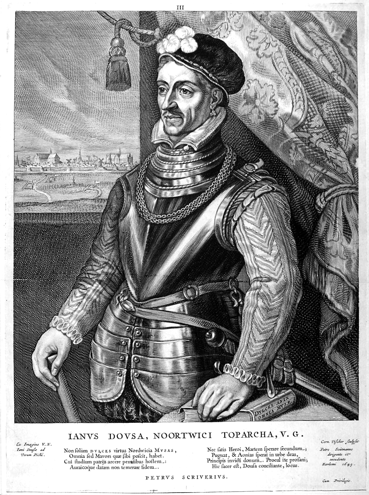 Johan van der Does a.k.a Janus Dousa (1545-1604)